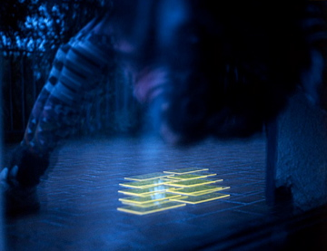 plexiglasarbeit